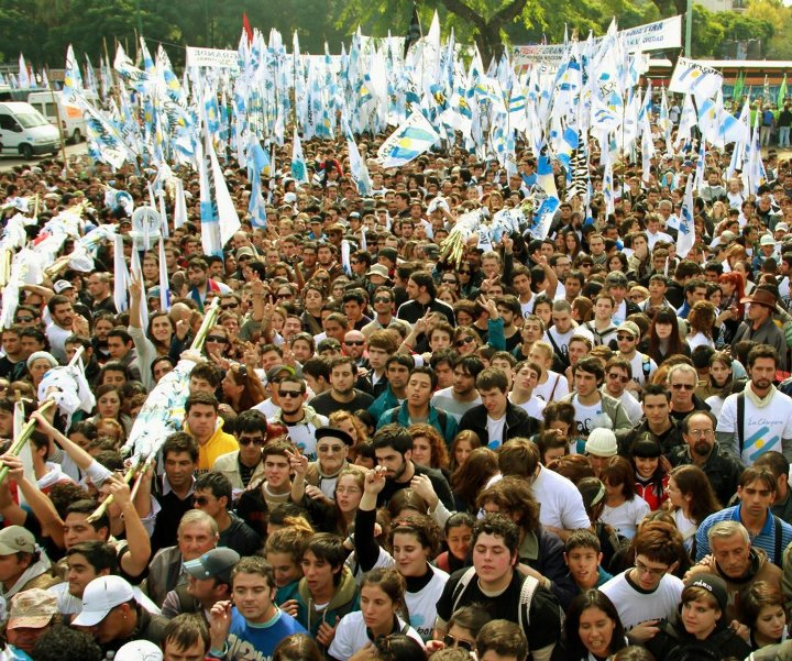 Concentración de jovenes kirchneristas.